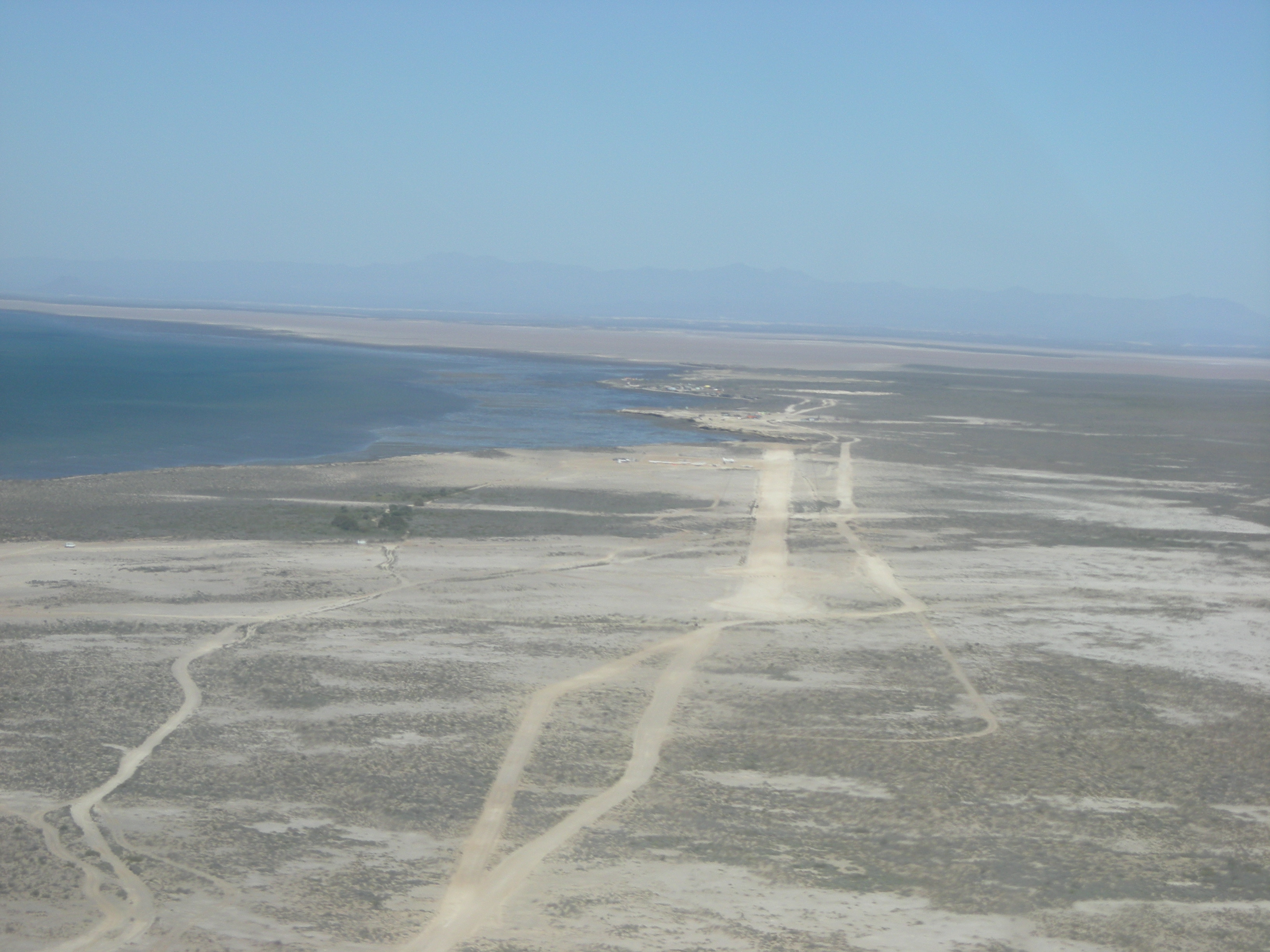 Airport at Laguna San Ignacio (RCX), Baja California Sur, Mexico